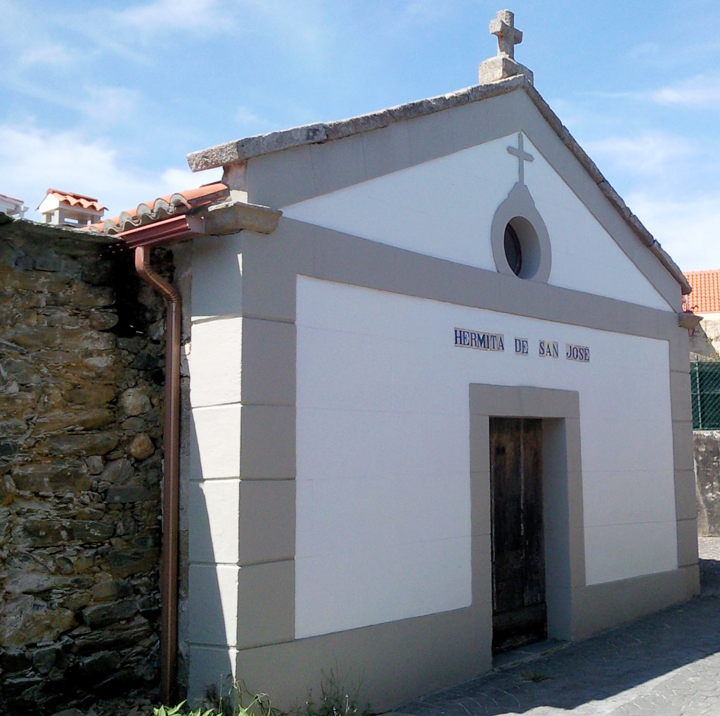 Ermida de San Xosé de Seselle